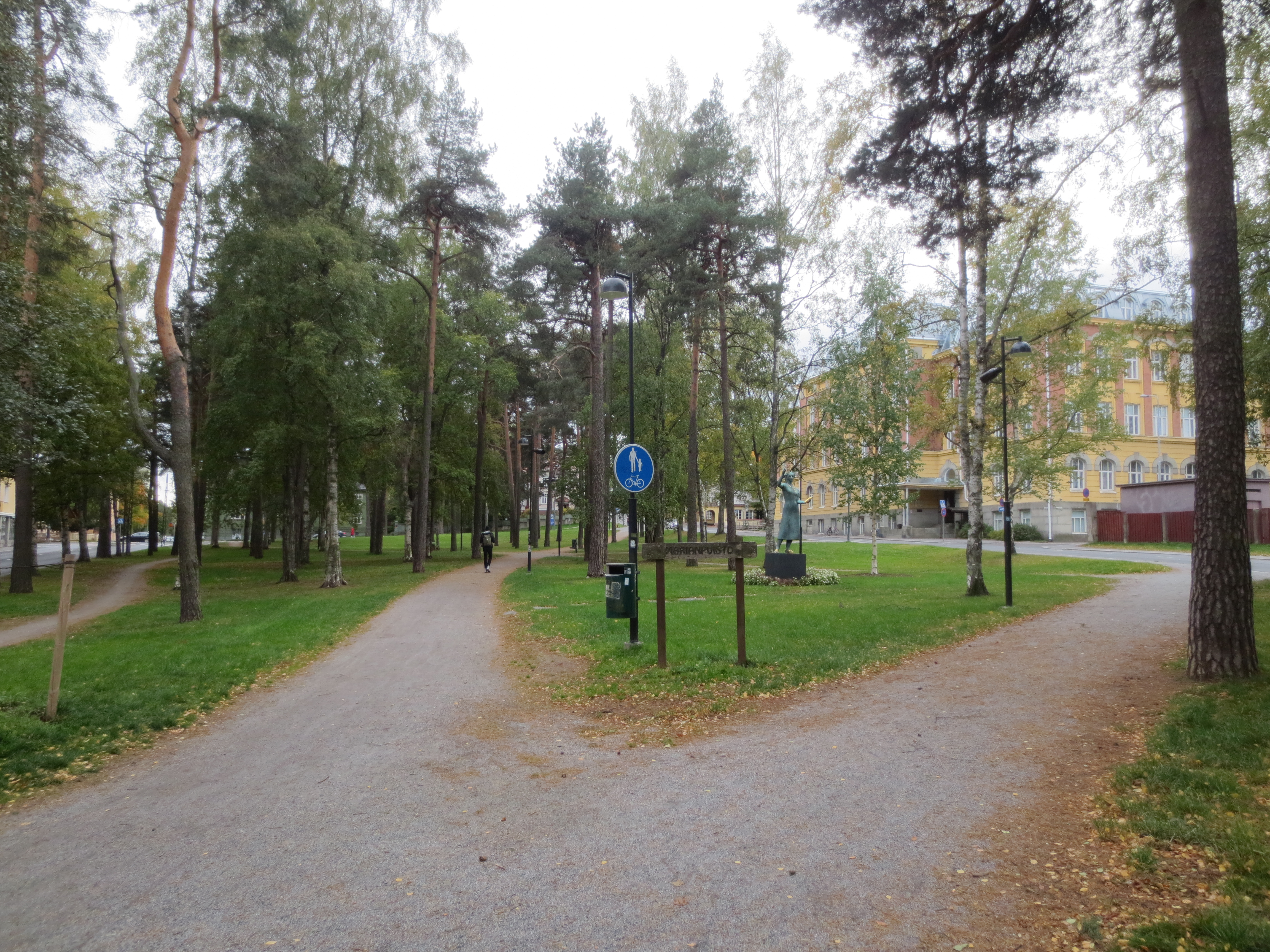 Marianpuisto Tampereella